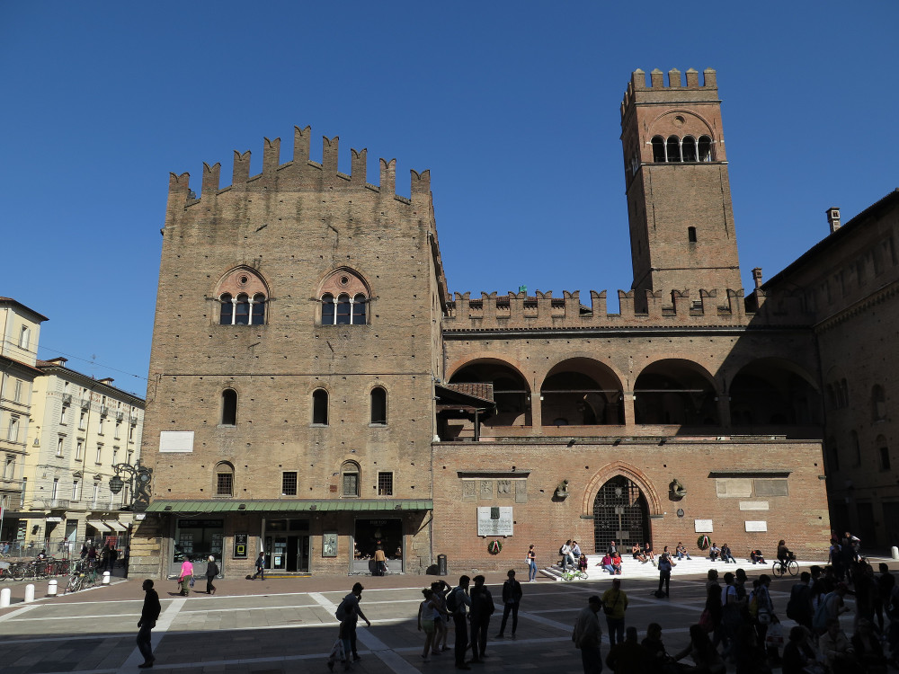 Palazzo Re Enzo This is a photo of a monument which is part of cultural heritage of Italy.